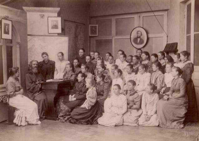 Урок Законовчителя Павла Григоровича у Недільній школі Христини Алчевської. 1895 рік.